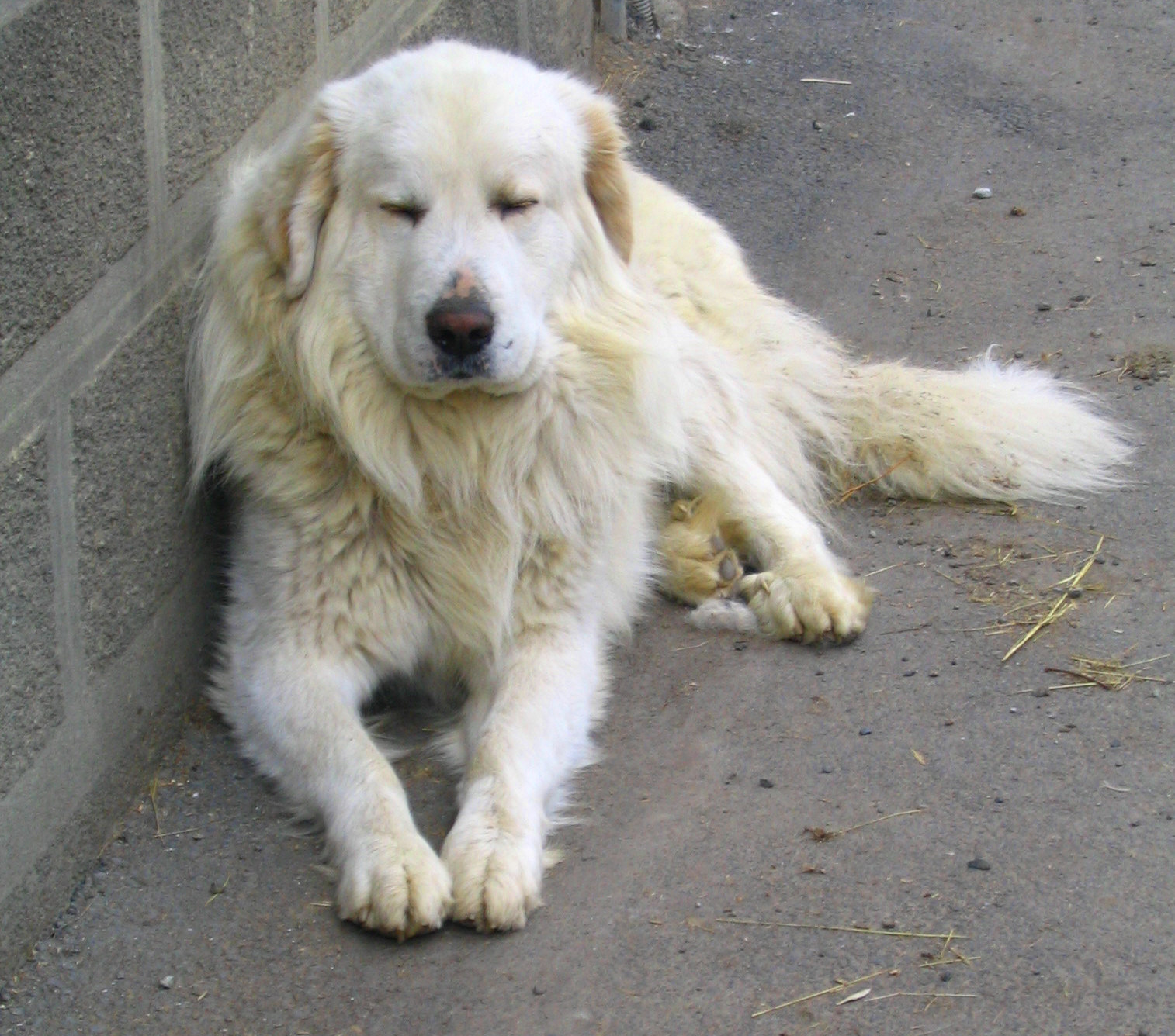 Chien des Pyrénées dit Patou Auteur: P Charpiat 2007